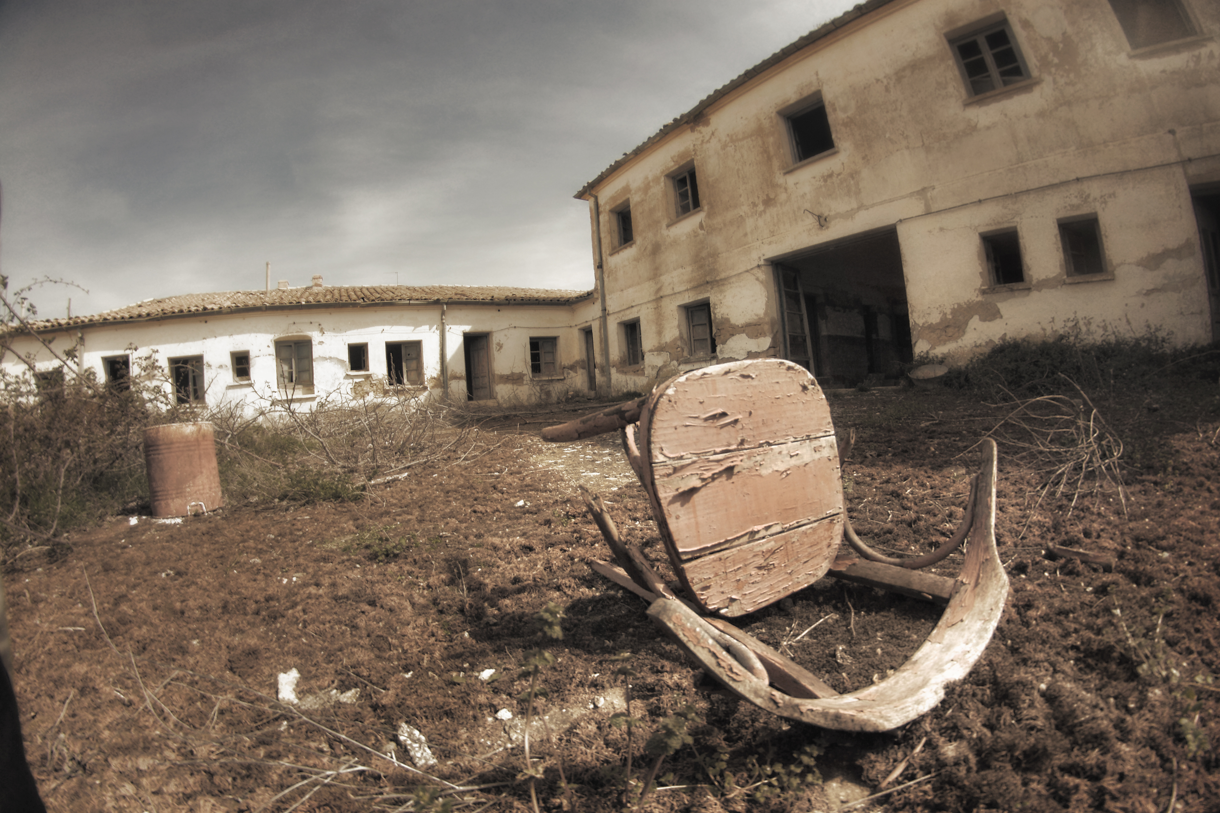 Farasdués, Zaragoza, Aragón